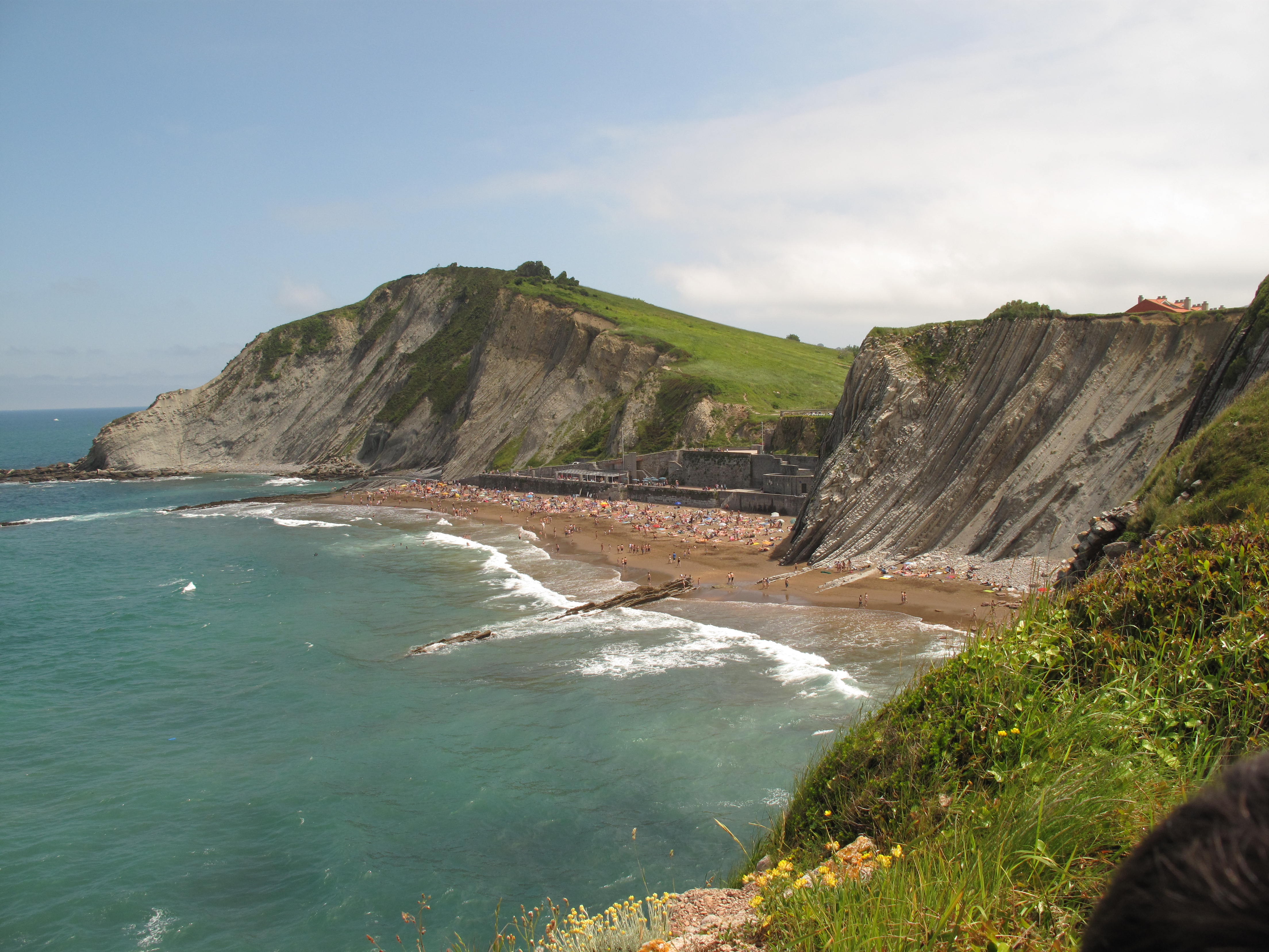 Flysch en Zumaia (Guipuzcoa) - Playa de Itzurun o San Telmo